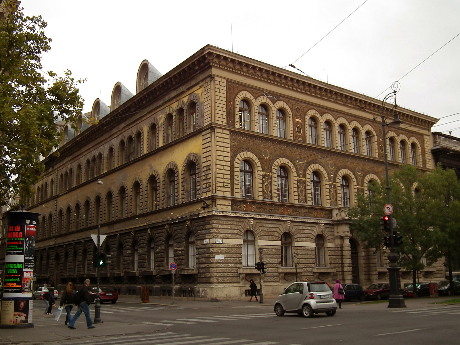 Képzőművészeti Főiskola (Budapest 6, Andrássy út 71., Izabella utca 54-58.) This is a photo of a monument in Hungary, Identifier: 715